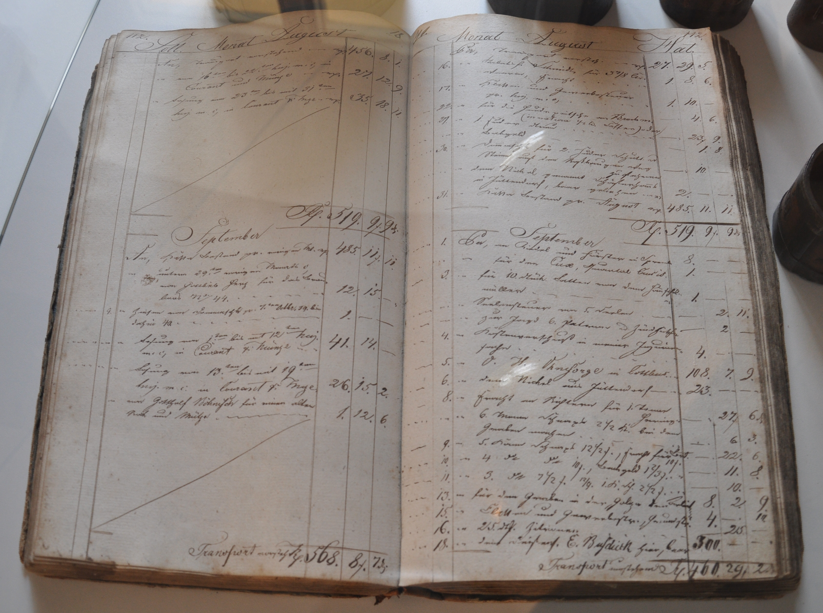 Museum Senftenberg (im Schloss Senftenberg) Geschäftsbuch 1833–1849